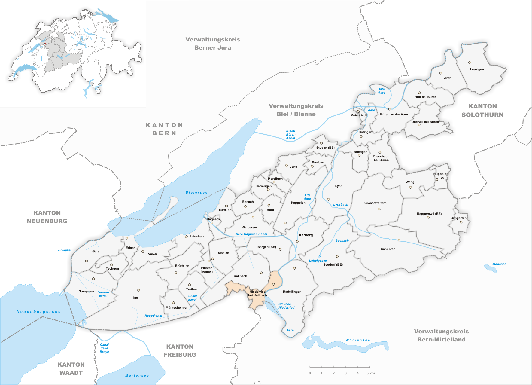 Municipality Niederried bei Kallnach